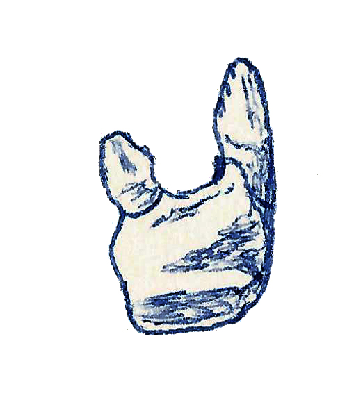 Illustration of a fossil of Azendohsaurus